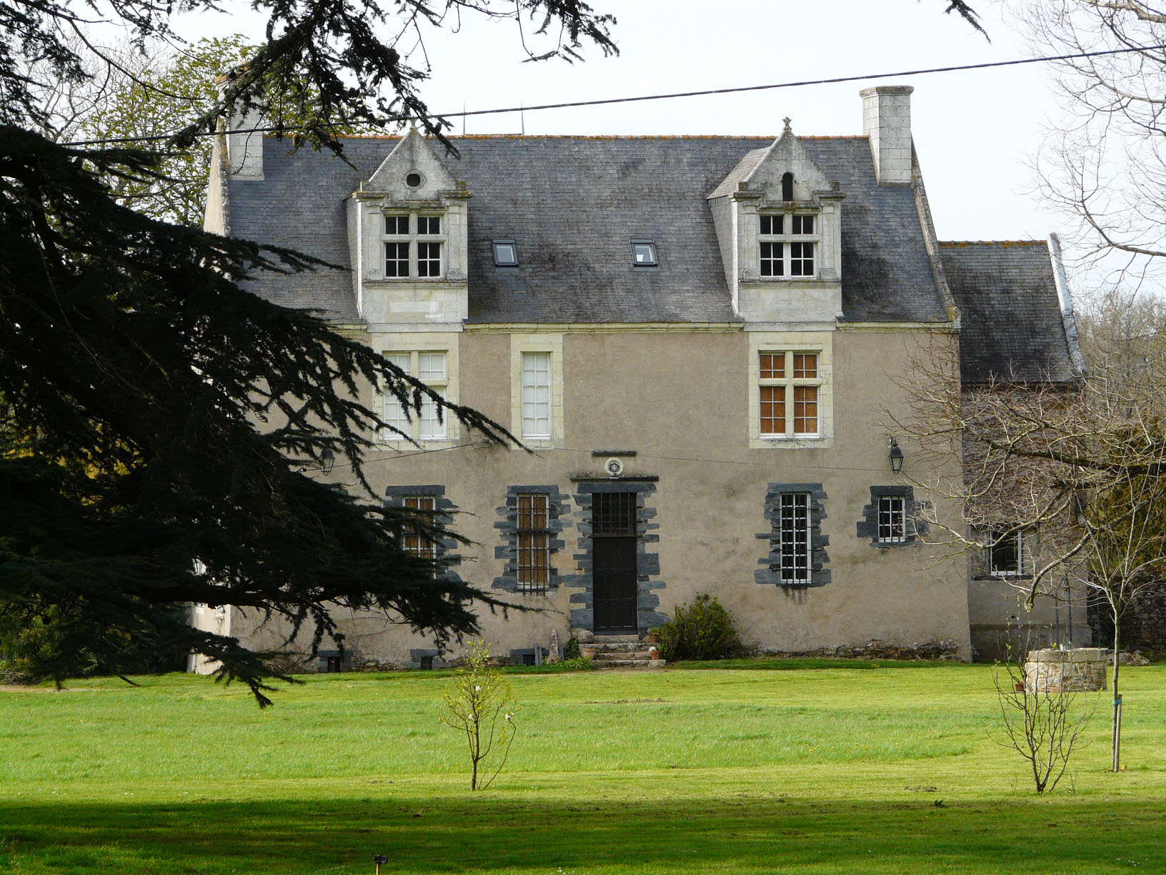 Manoir de la Quétraye, Mésanger(44)